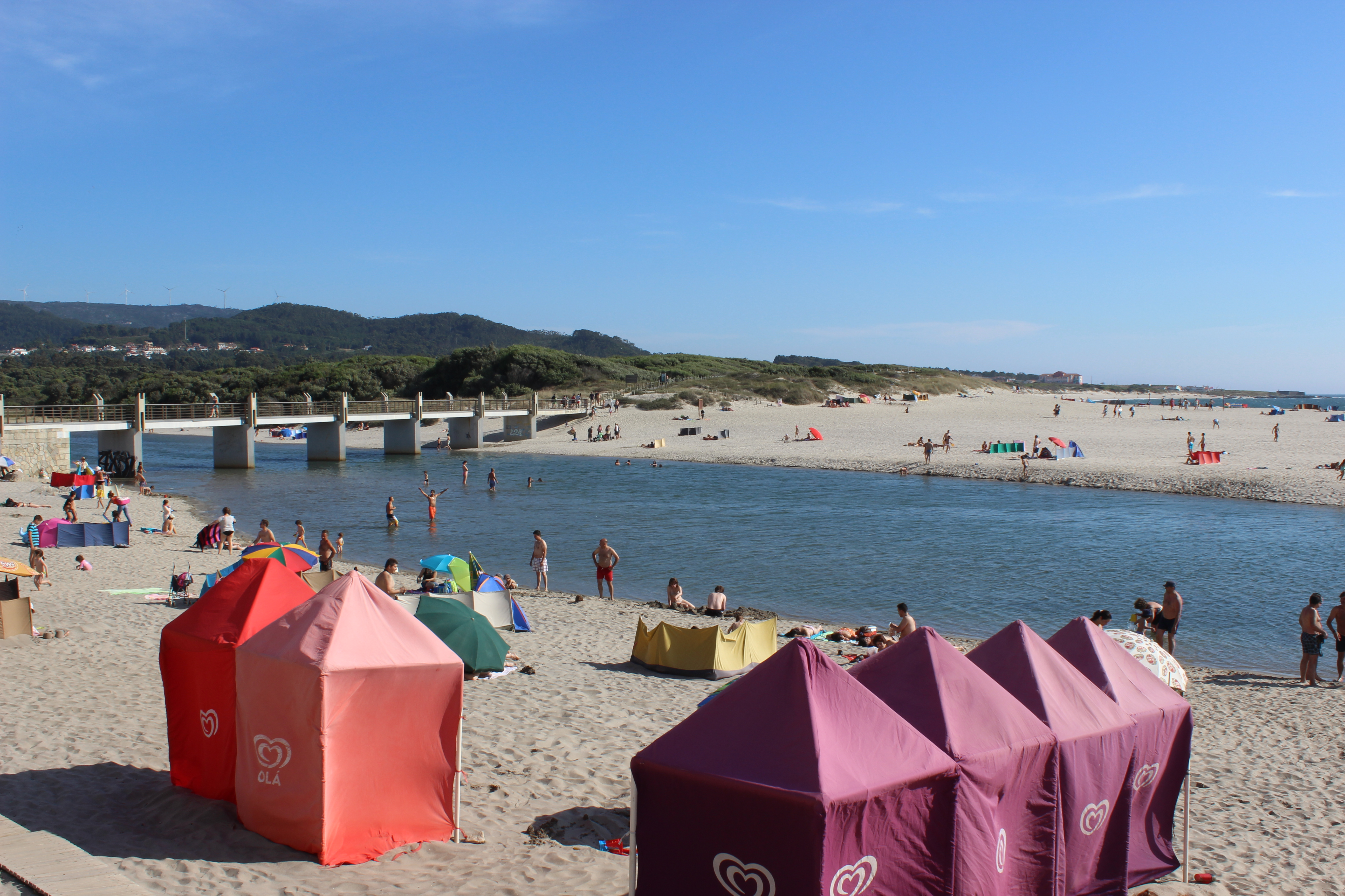 Vila Praia de Ancora